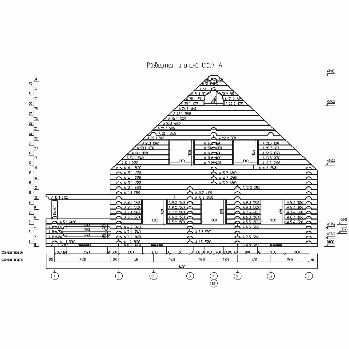 Отчёт Развёртка по стене в программе К3-Коттедж